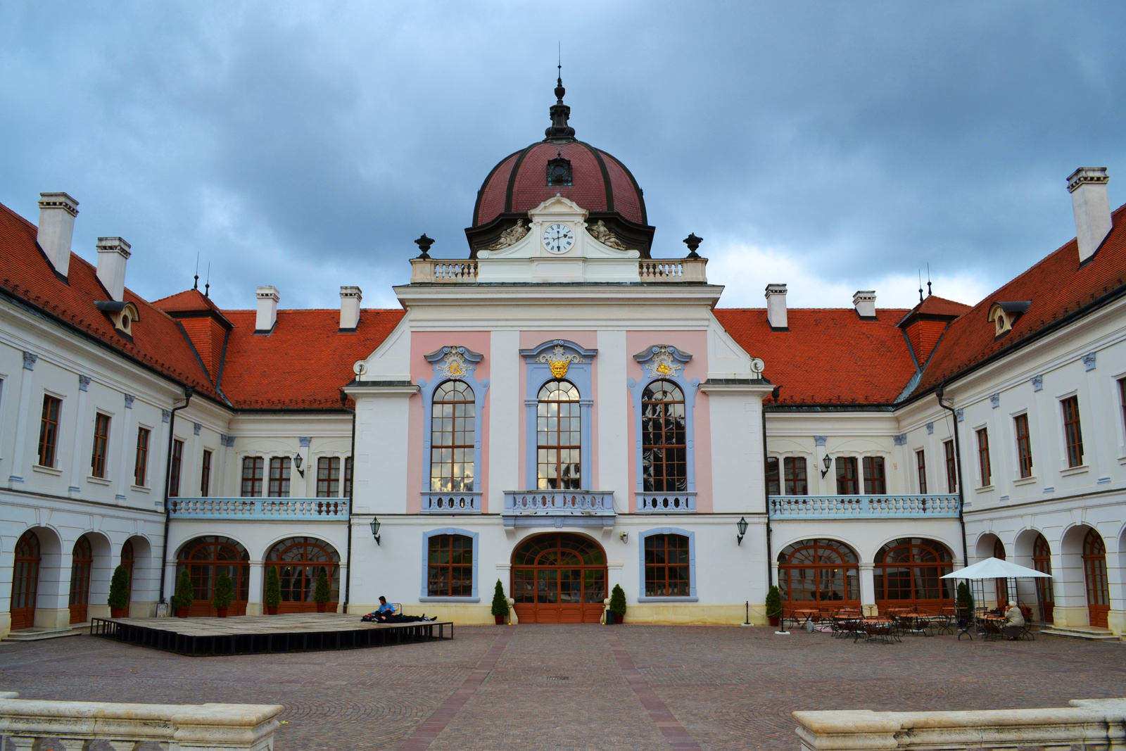 Grassalkovich-kastély (Gödöllő, Martinovics utca 16.) This is a photo of a monument in Hungary, Identifier: 7051